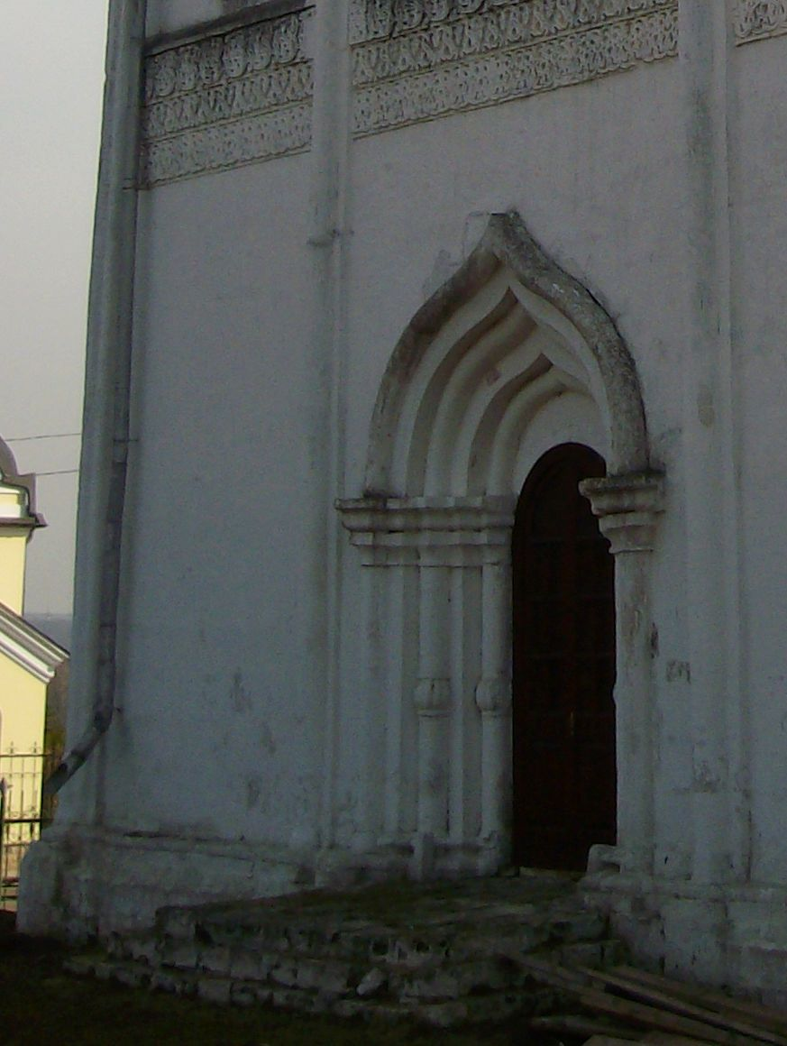 Успенский собор на Городке в Звенигороде.